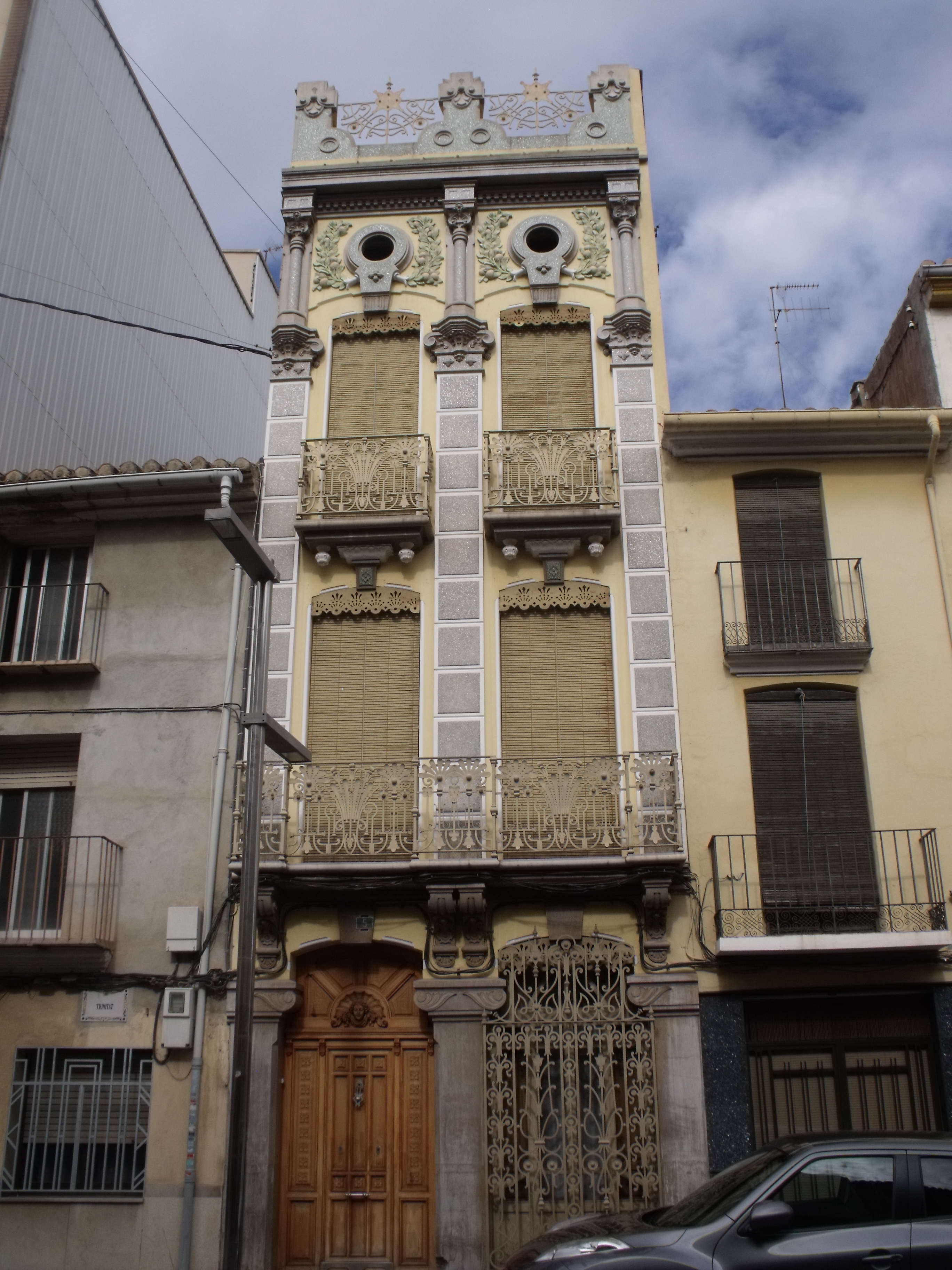 Casa del Metge Castell en Almassora, calle Trinidad nº 5.